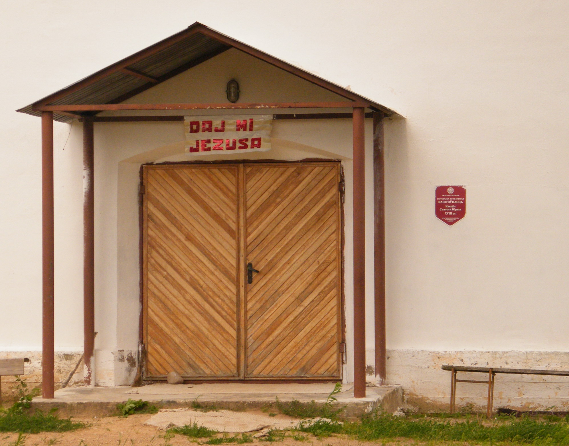 Беларуская (тарашкевіца): Касьцёл Сьв. Георгія. в. Варона This is a photo of Belarusian heritage monument. Reference number: 412Г000041 ( WLM)